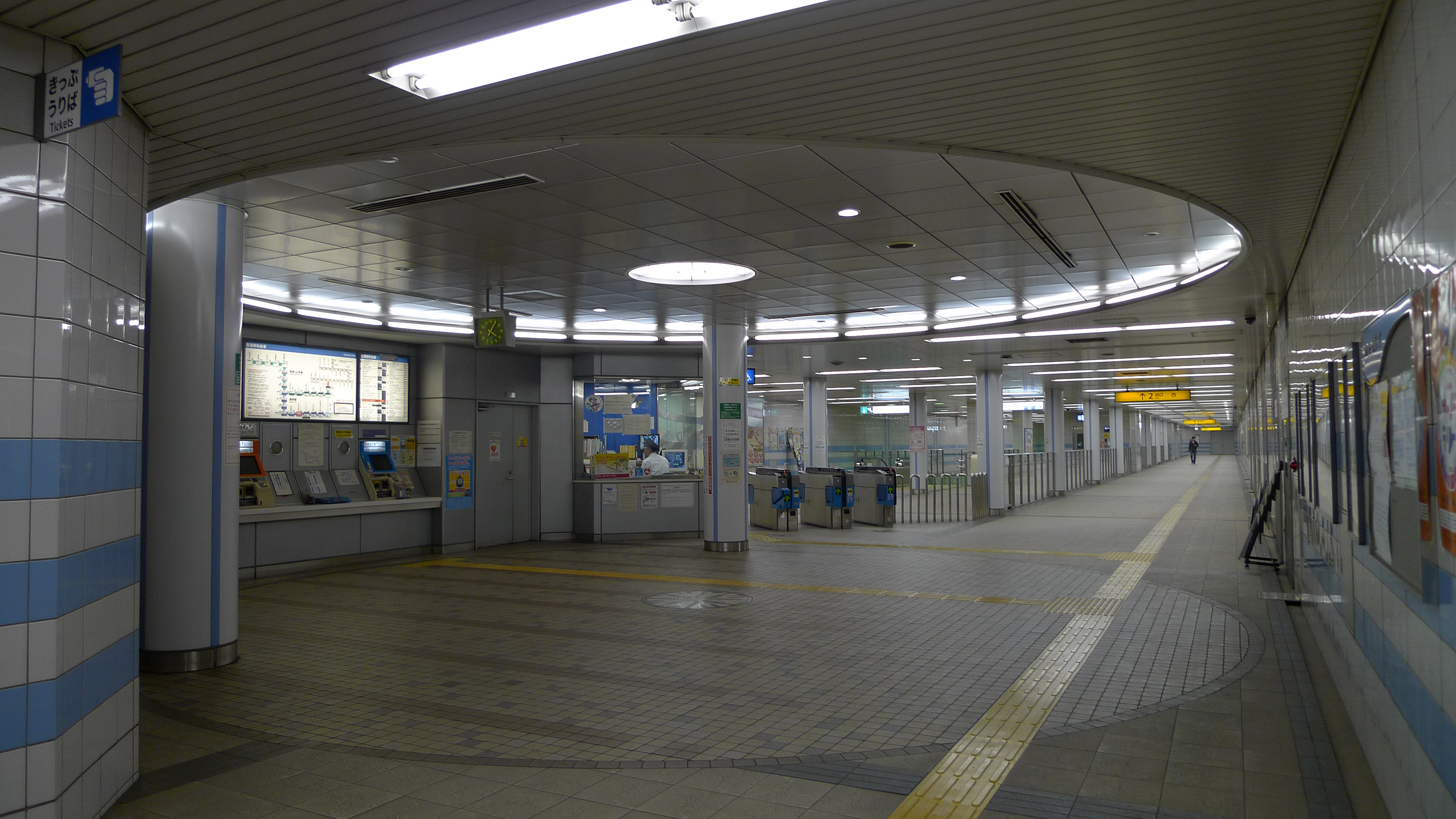 神戸市営地下鉄海岸線中央市場前駅改札口